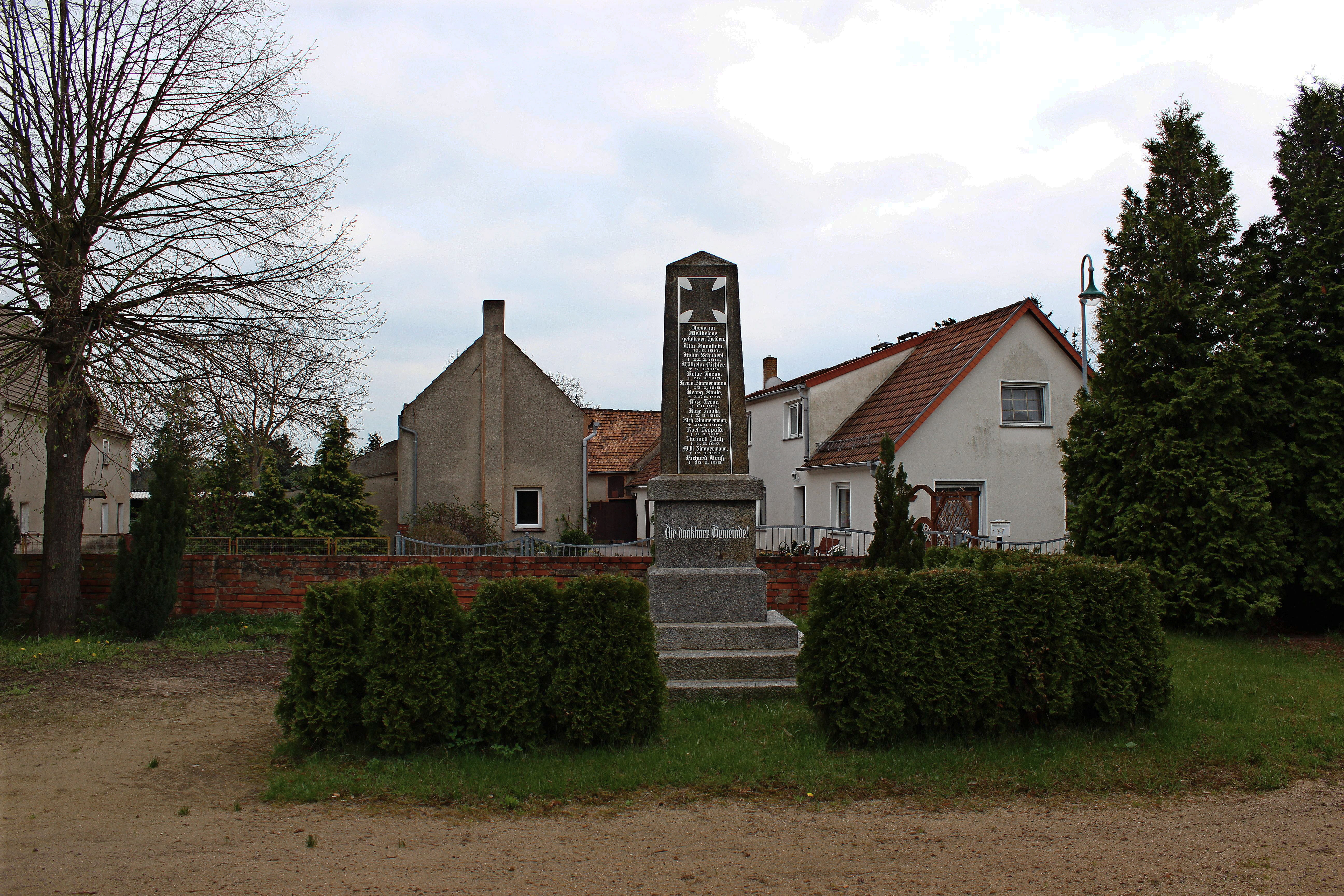 Bönitz.